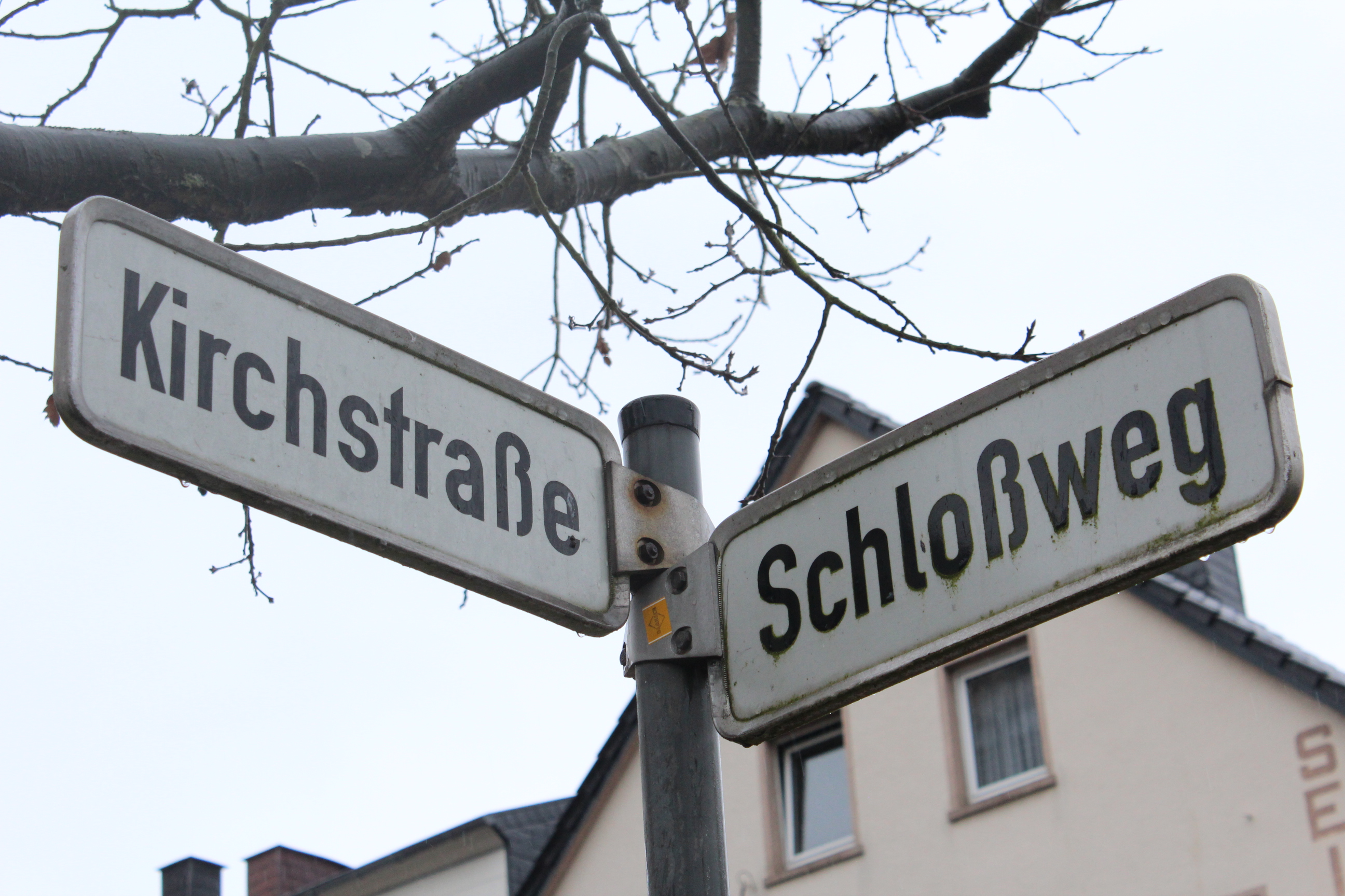 Kirchweg Ecke Schloßweg in Altenkirchen (Straßenschilder)